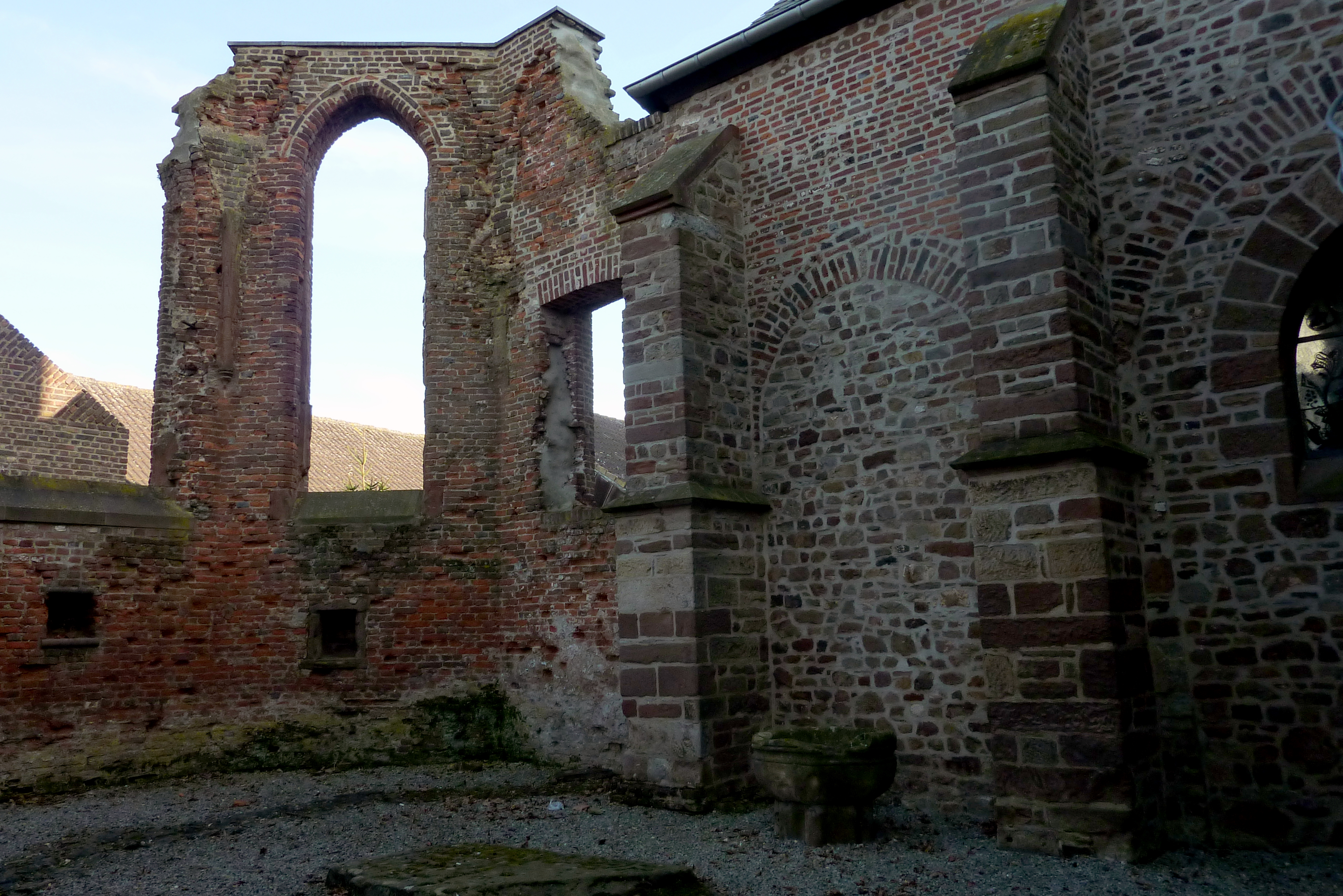 Kirche Klein St. Arnold (Arnolduskapelle) in Arnoldsweiler im Kreis Düren in Nordrhein-Westfalen (Deutschland), Ruine des Kirchenschiffs